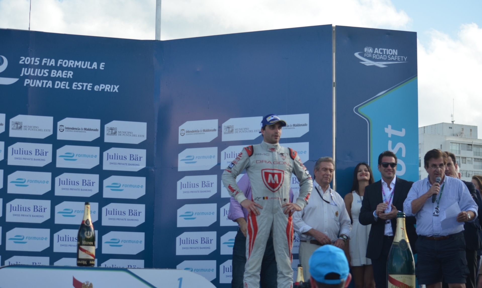 Solo se permite el uso de esta imagen mencionando a Velocidad Total como su autor. Imagen de la ceremonia de premiación del Punta del Este ePrix de 2015, en el podio ubicado en la Playa Brava.